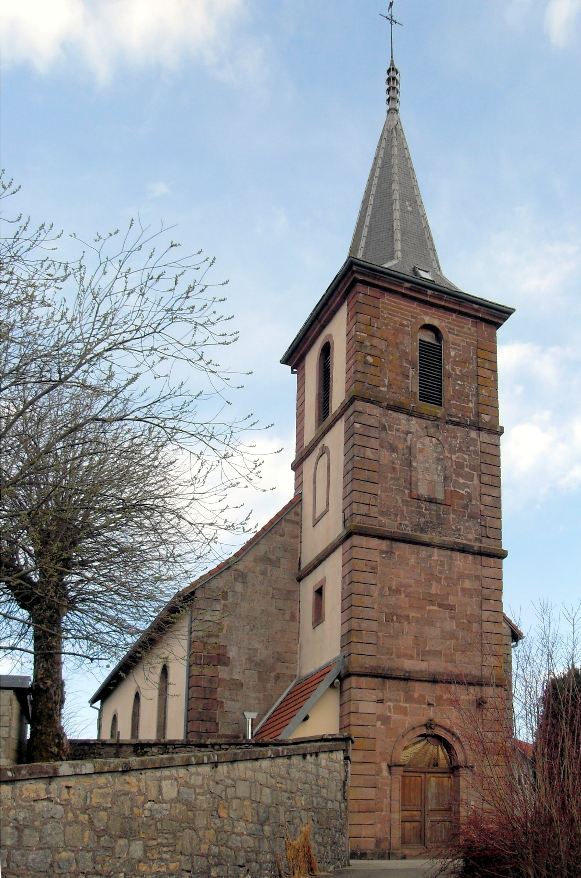 L'église Saint-Léger d'Essert